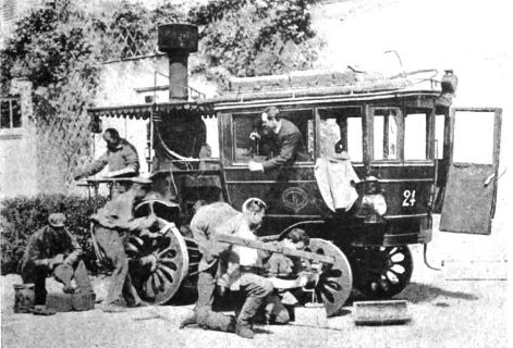 La Nouvelle, voiture Amédée Bollée de 1880, ici au retour de Paris-Bordeaux-Paris en 1895, Histoire de l'automobile, Pierre Souvestre, éd. H. Dunod et E. Pinat, 1907 (ASIN B001BPBE58) p.137